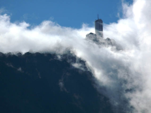 Vista del Hotel Humboldt, sobre la cima del Cerro Waraira Repano (El Ávila).